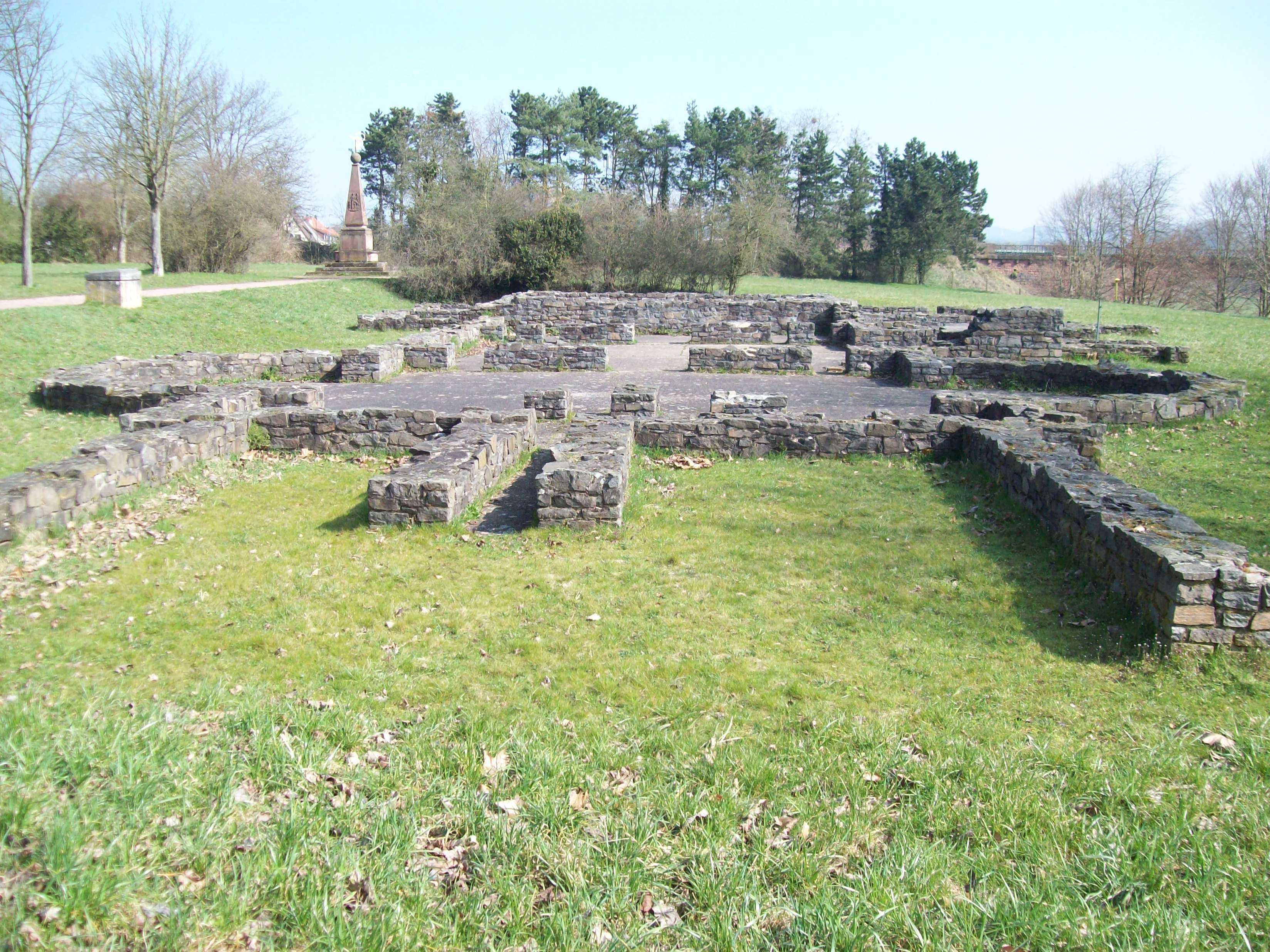 Kastellbad Stockstadt 1968/69 bei Erweiterung des PWA Fabrik-Geländes hierher versetzt.